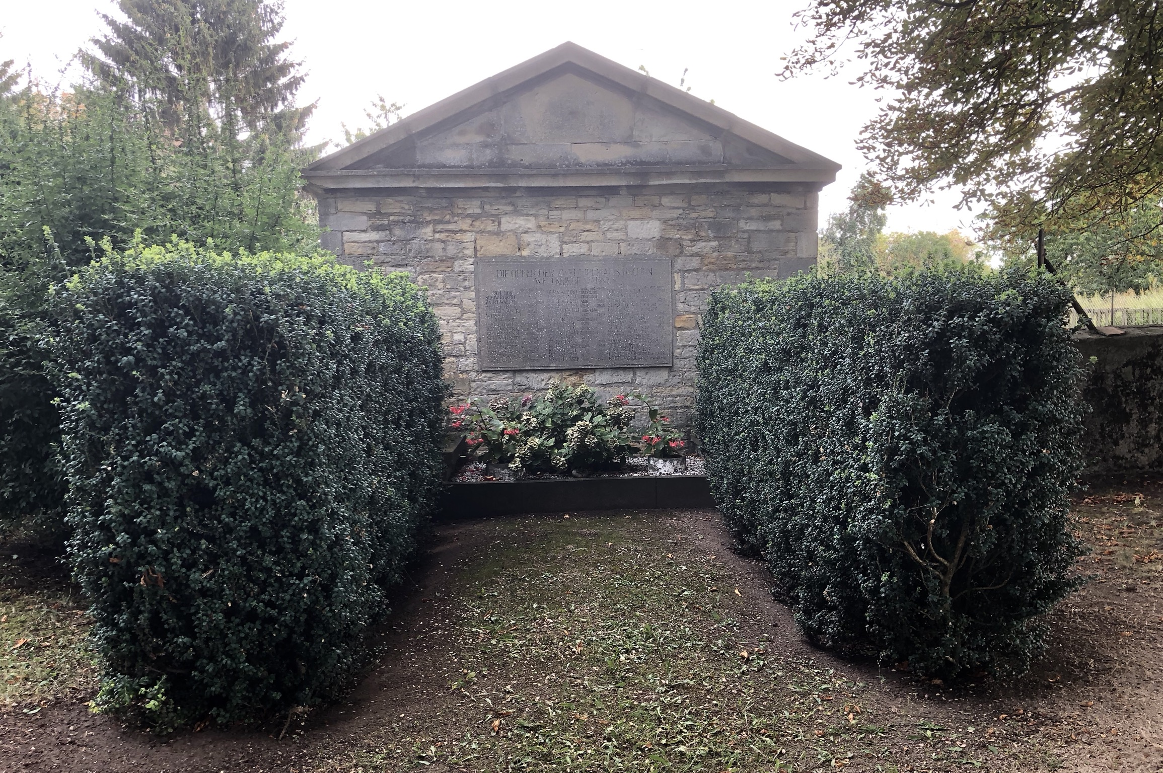 Kriegerdenkmal für die Gefallenen des 1. und 2. Weltkrieges auf dem Friedhof Peseckendorf